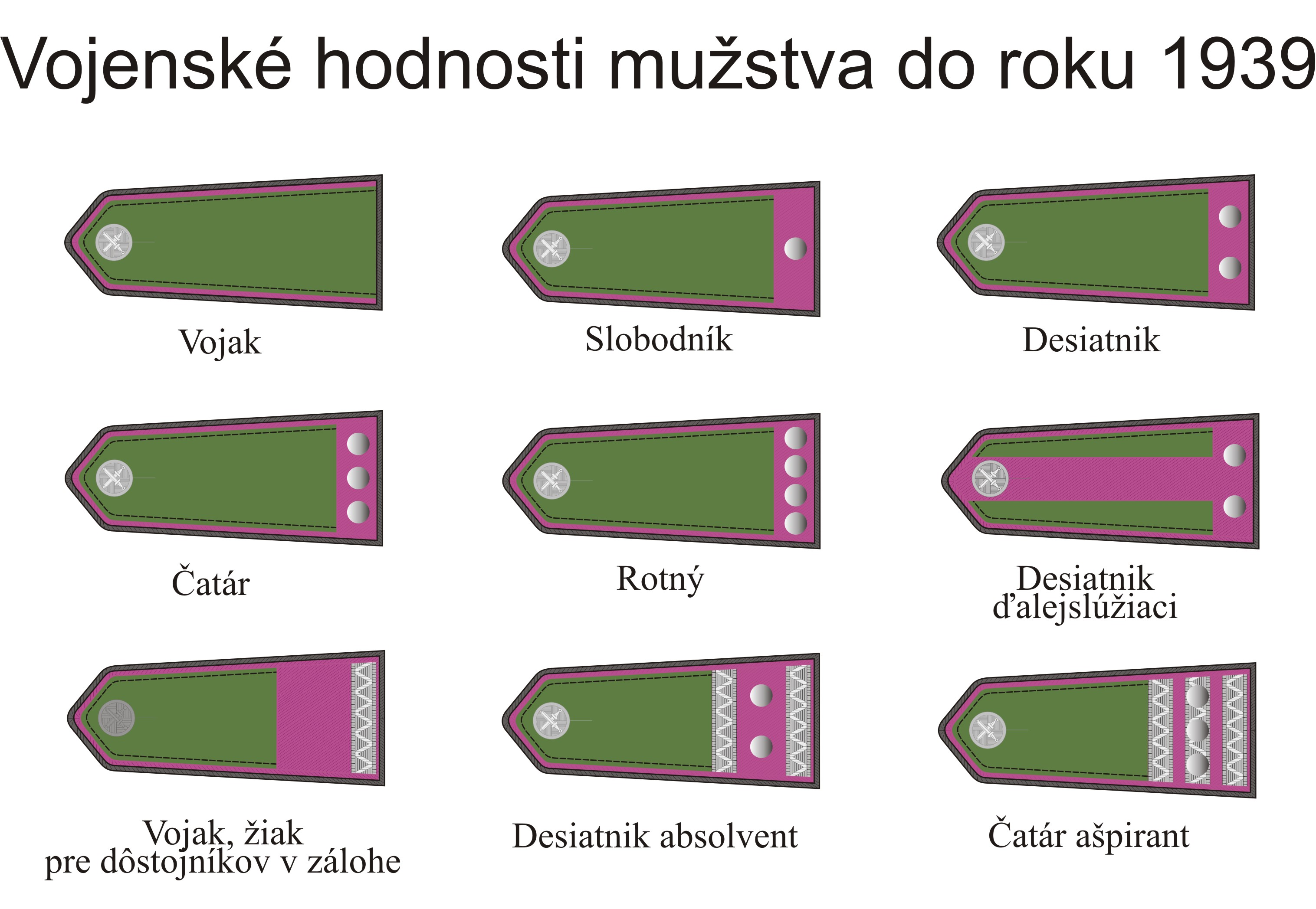 Hodnostné označenie mužstva armády Česko-Slovenskej republiky od jej vzniku do roku 1939